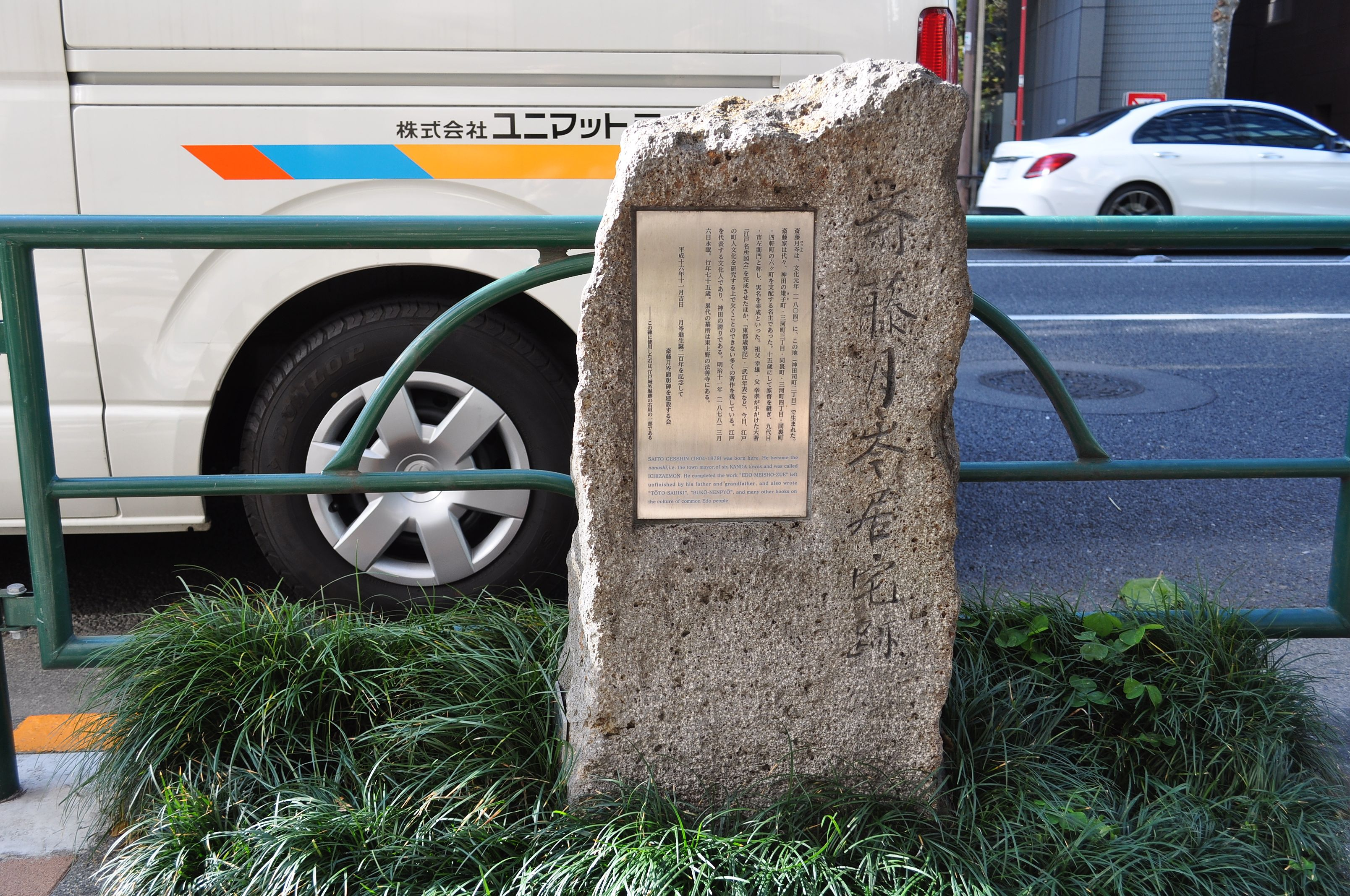 斉藤月岑居宅跡の碑